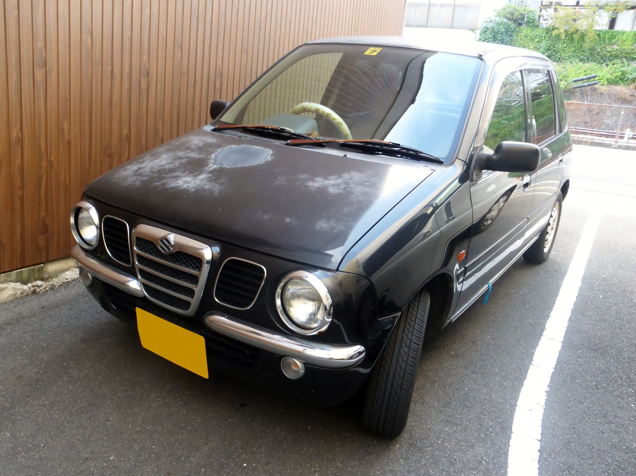 CN22S型スズキ・セルボCをフロントから撮影。